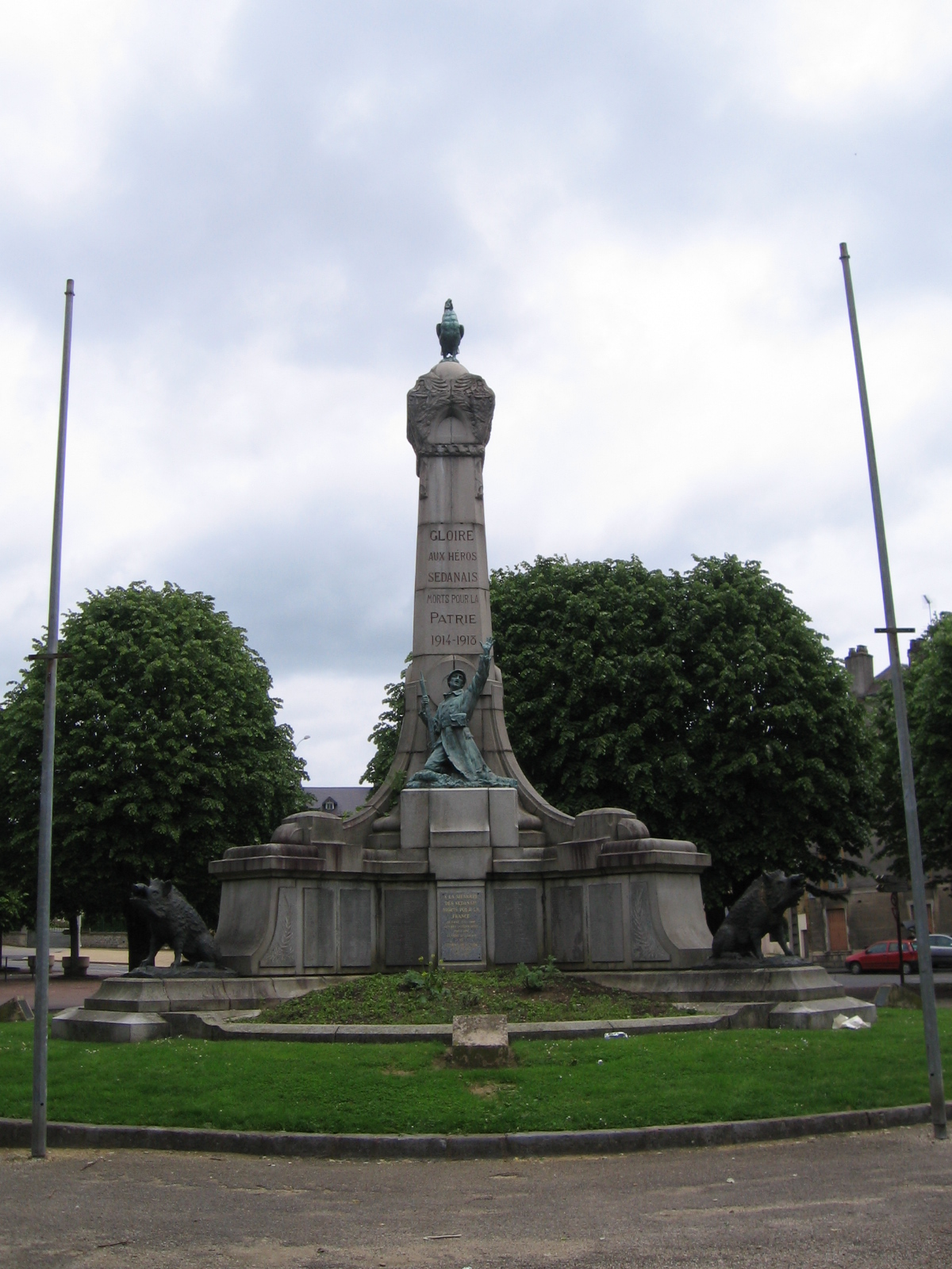 Sedan